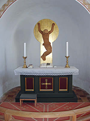 Altertavle i Skivholme Kirke, Framlev Herred - Århus Amt, Denmark.